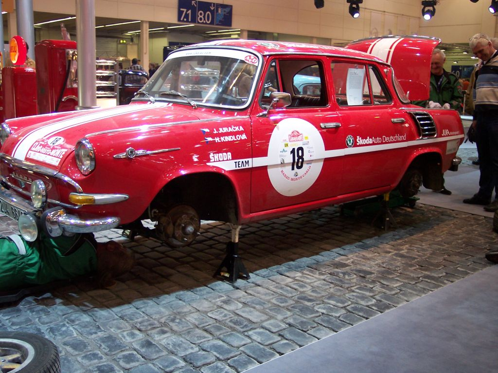 Škoda 1000MB (Techno Classica Essen 2007)